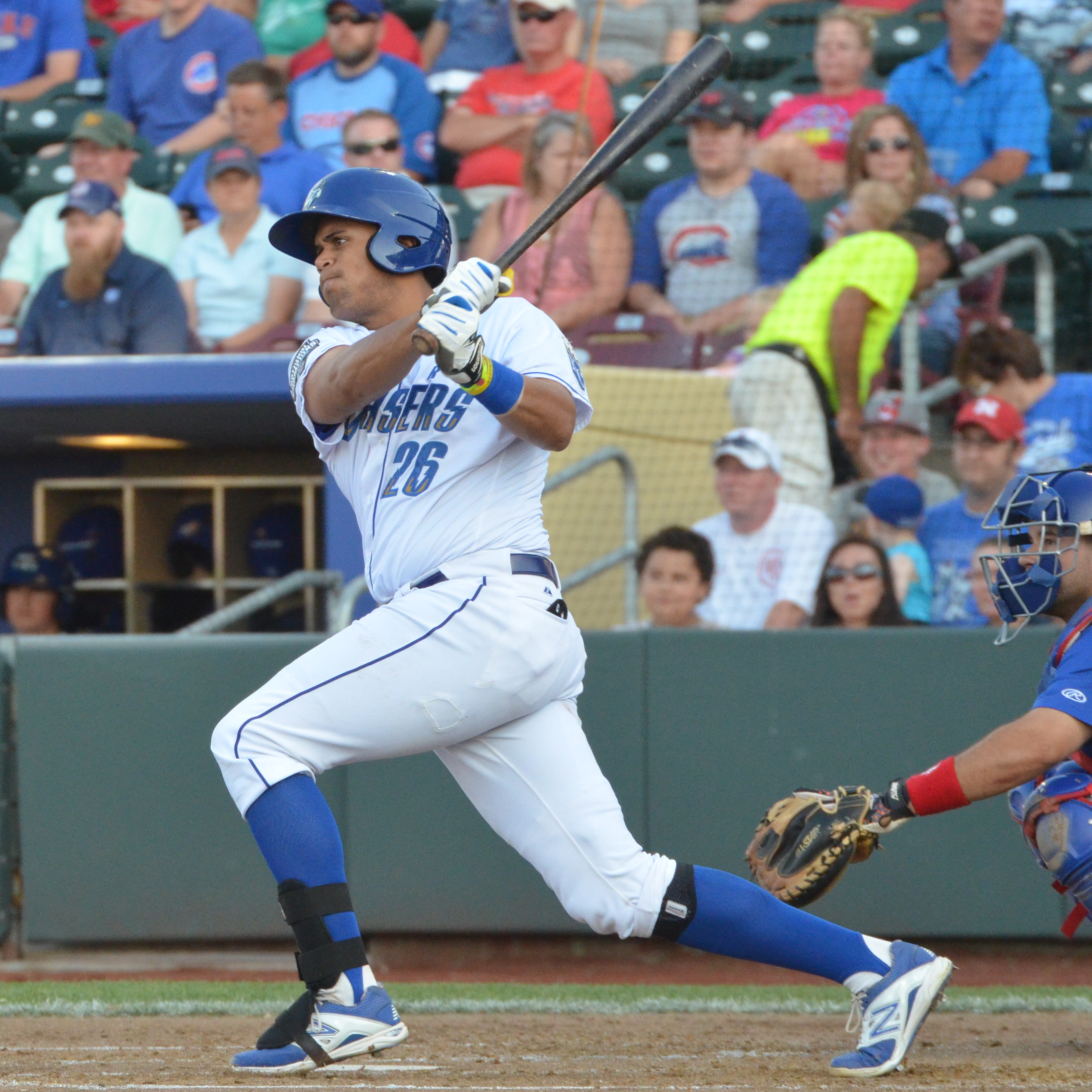 Francisco Peña